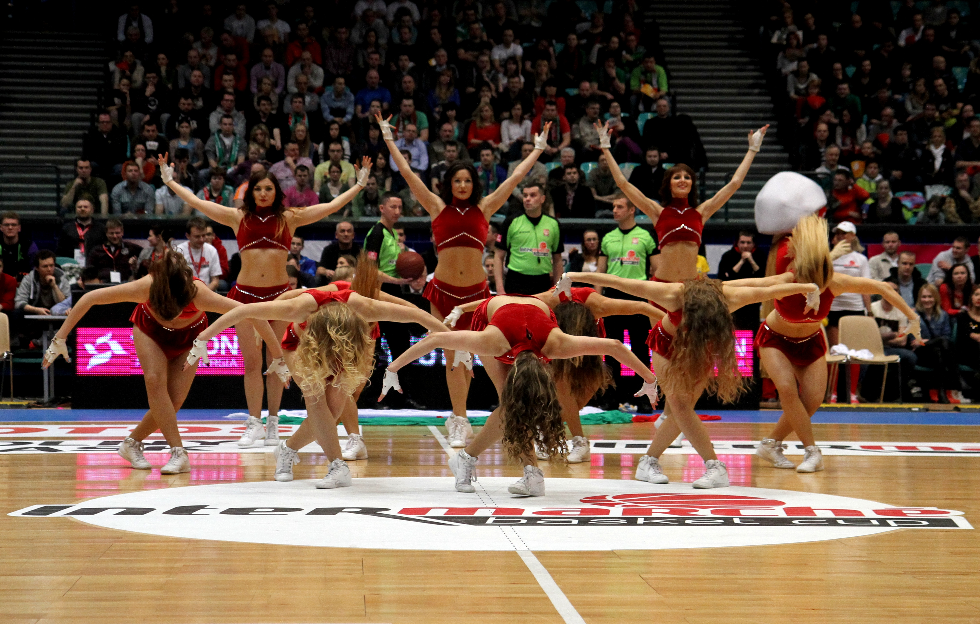 Cheerleaders Wrocław